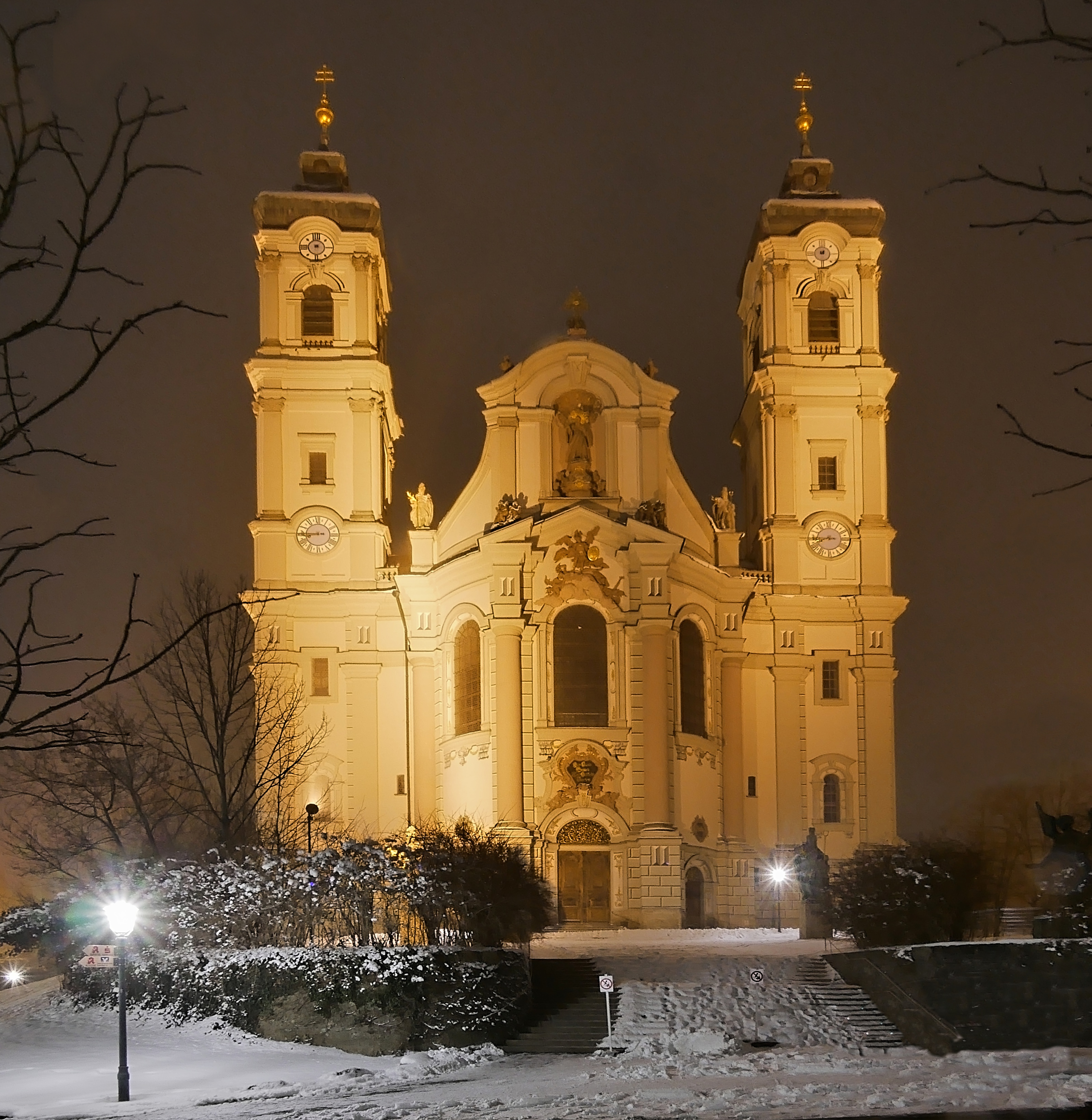 Basilika Ottobeuren